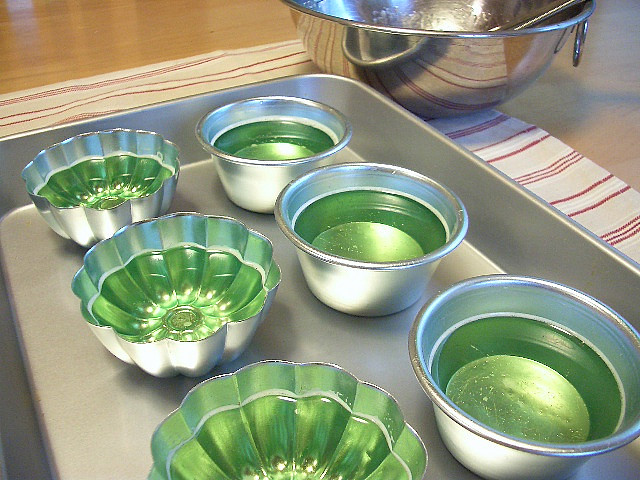 これから、冷蔵庫で冷やします：） ゼリエース ?